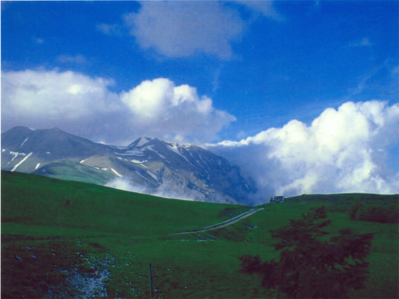 Valico di Forca di Presta con il monte Vettore. A destra si nota il rifugio Giacomini, meglio conosciuto come il rifugio degli Alpini (1550 m)